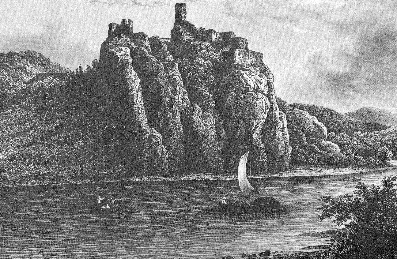 Historische Ansicht von Burg Schreckenstein (heute Strekov) bei Aussig a. d. Elbe (Ústí n. L.) in Tschechien. Stahlstich.